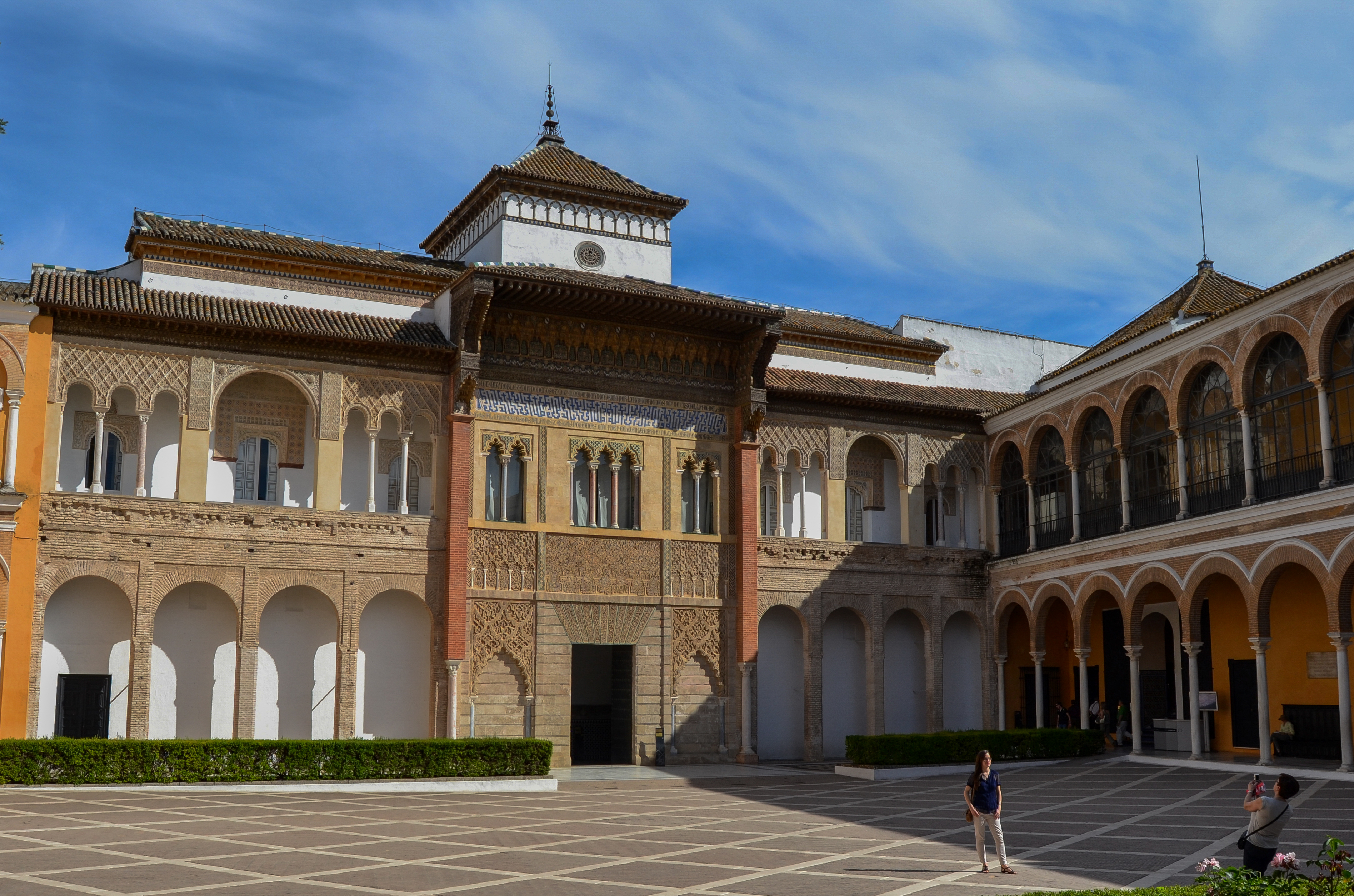 Patio de la Montería, desde donde se puede contemplar la fachada del palacio de Pedro I y la Casa de la contratación